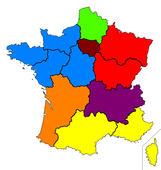 Zone de défense en France à la suite du redécoupage des régions.